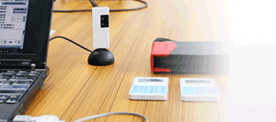 Receptor USB para el sistema de votación interactiva de CustomVote, el receptor captura la respuesta de los mandos de votación electrónicos y lo envía al software de votación.